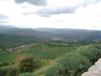 La Plana de l'Aglin